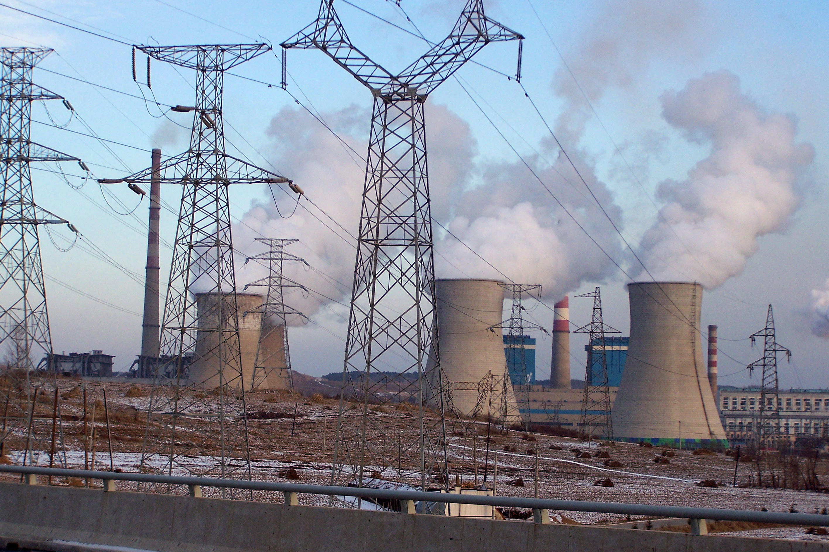 辽宁发电厂附近